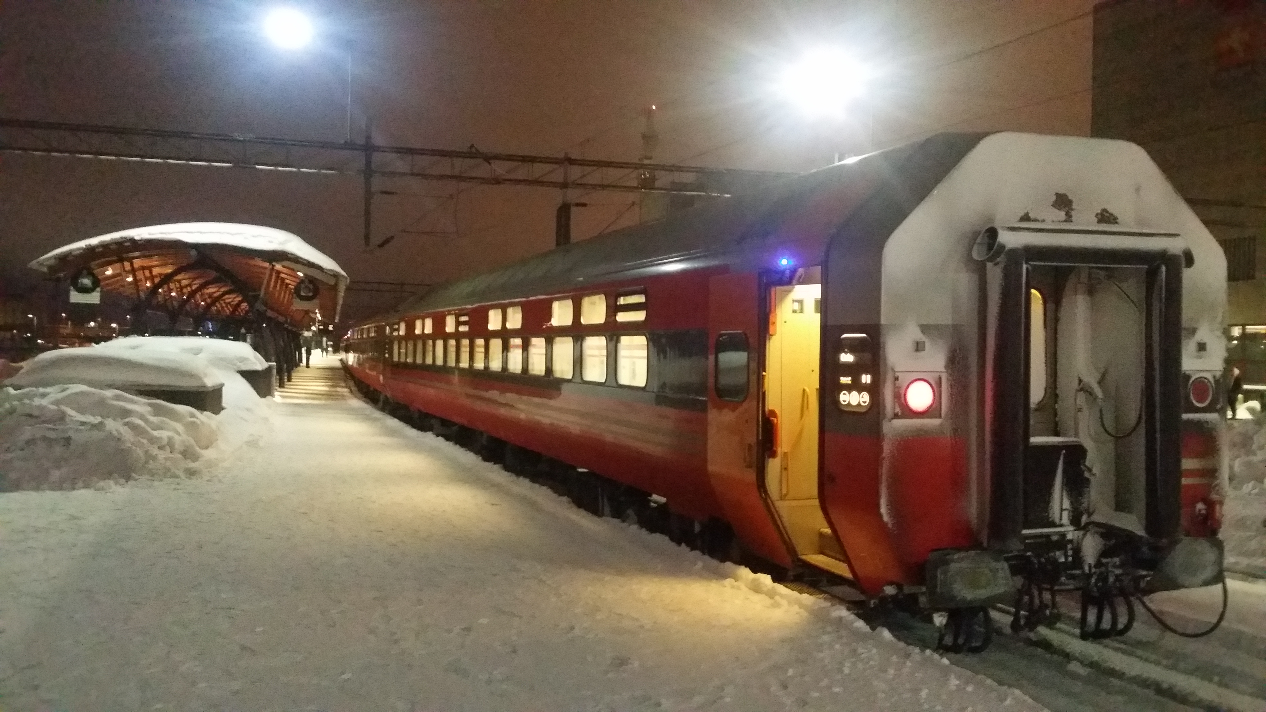 WLAB-2 - vogn i nattog 744 Stavanger-Oslo. Drammen stasjon.